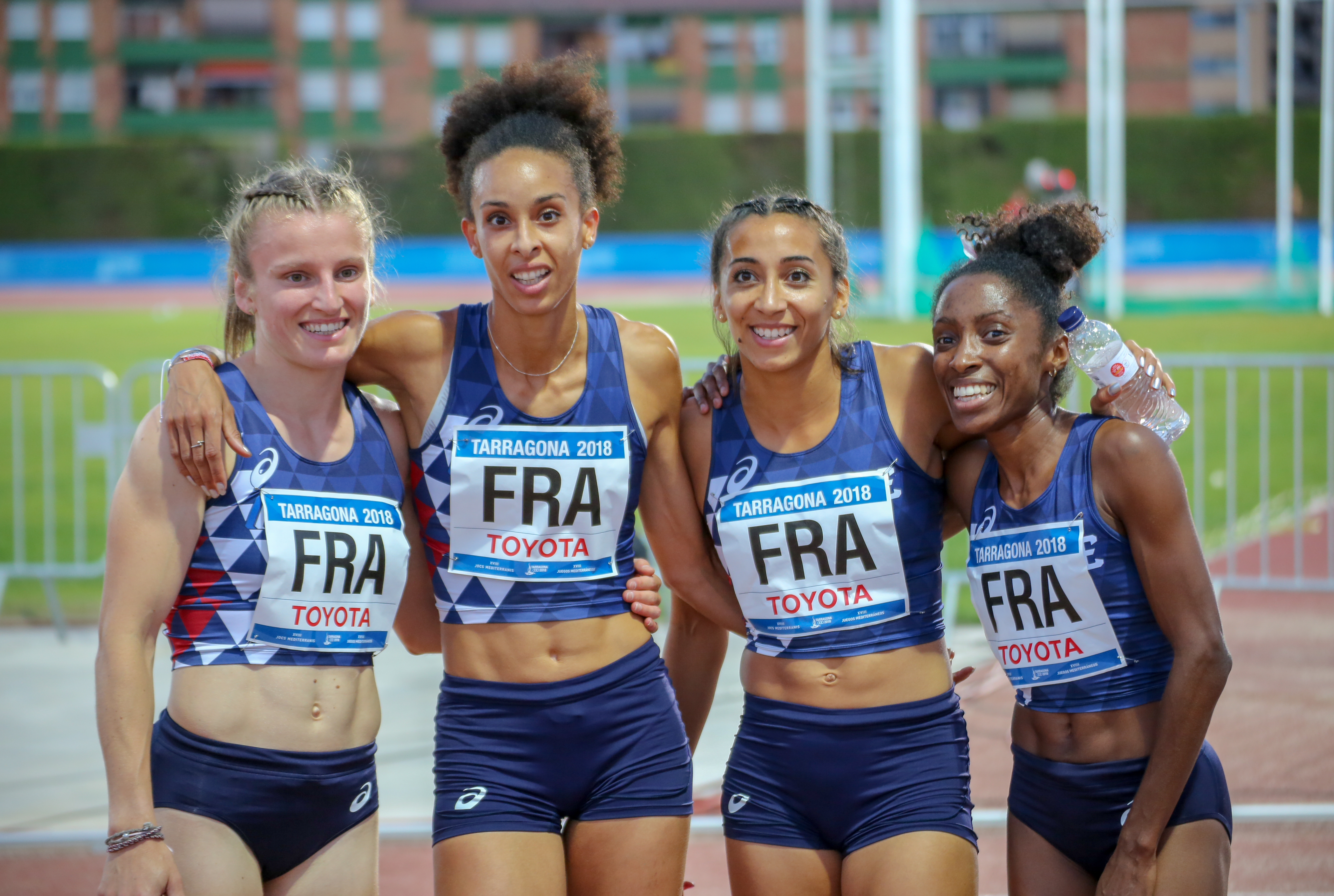 Francia en los relevos 4x400 en los Juegos del Mediterráneo 2018 (Amandine Brossier, Agnès Raharolahy, Cynthia Anaïs, Elea-Mariama Diarra)